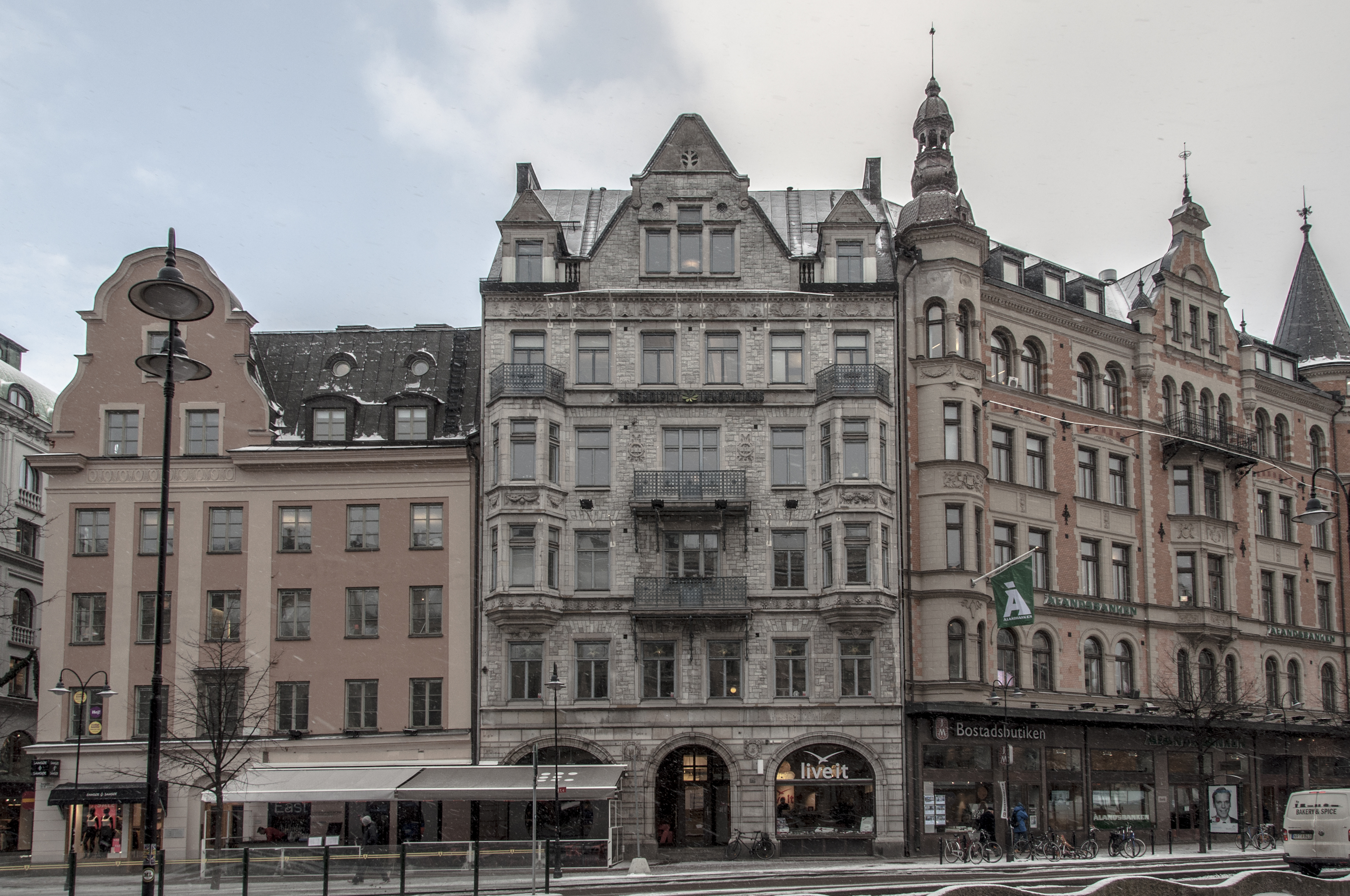 "Lilljekvists hus" - Sumpen 10, Stureplan 15, Nybyggnadsår 1896 - 1897, Carl Aug. Olsson (Byggmästare) Fredrik Lilljekvist (Arkitekt) Fredrik Lilljekvist (Byggherre)